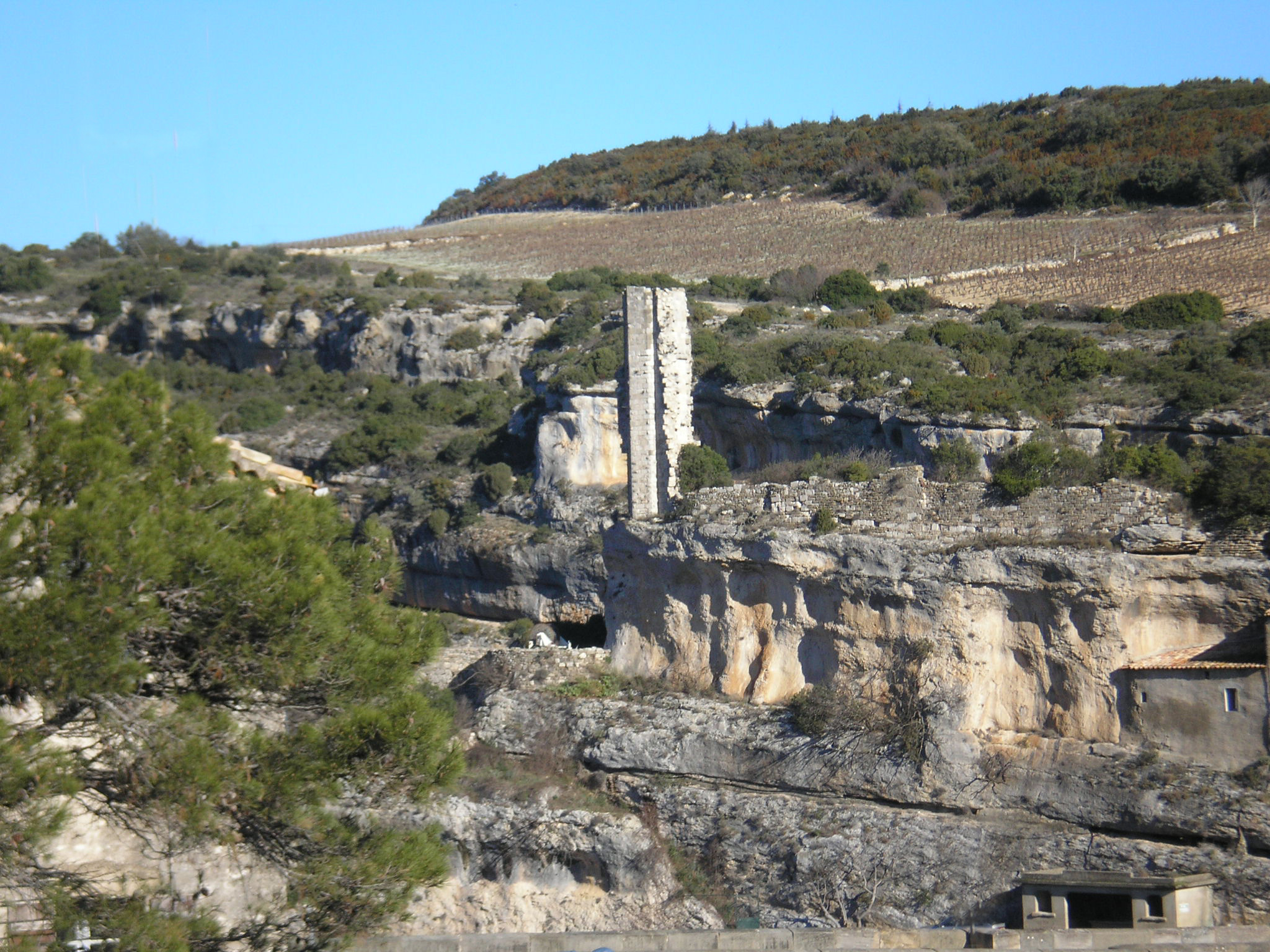 Minerve (Hérault) - reste du château (la Candela).